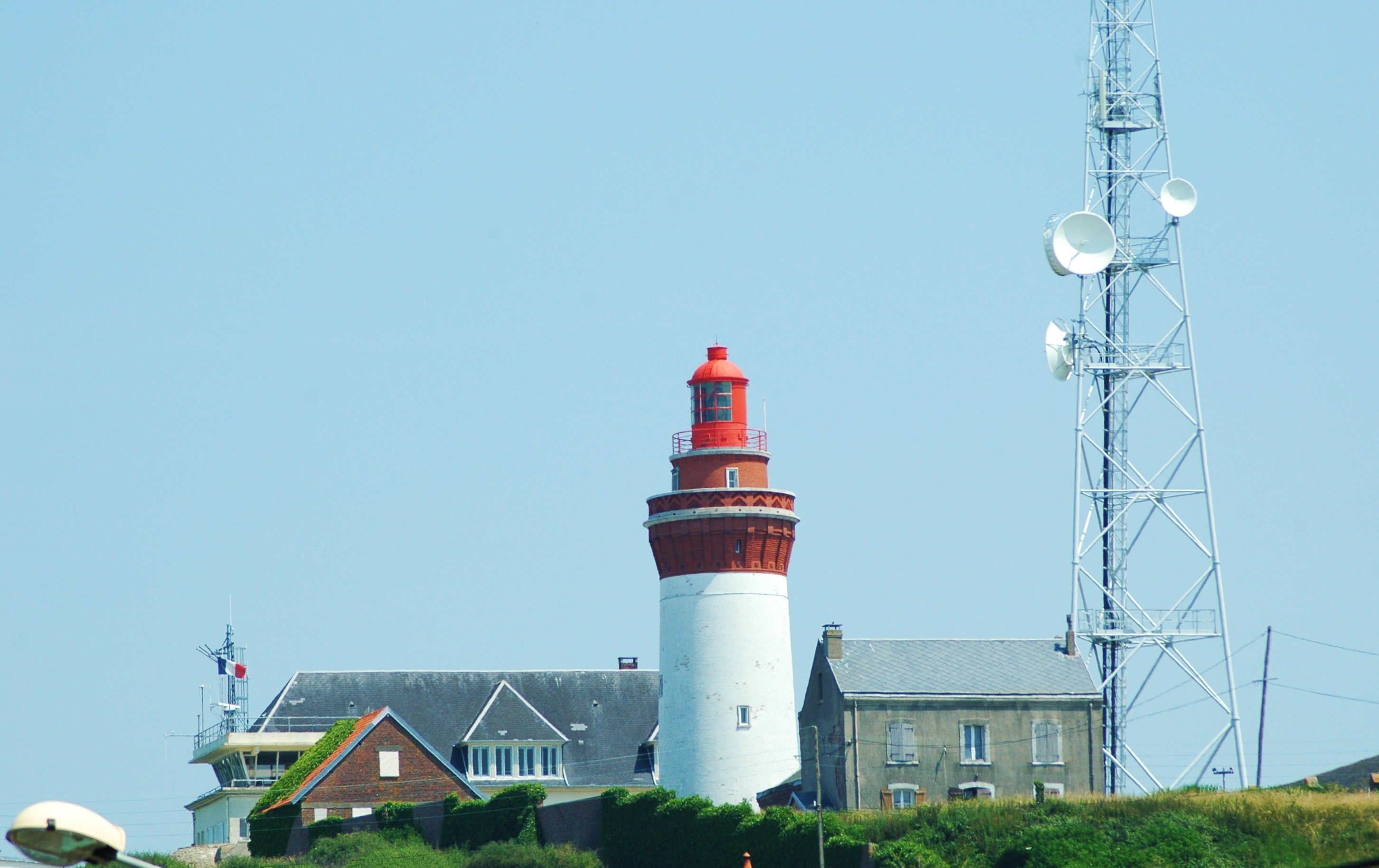 Faro de Ault, en la región de Somme, Francia